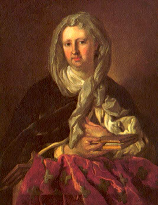 Vittoria Francesca (1690-1766), Fürstin von Carignan